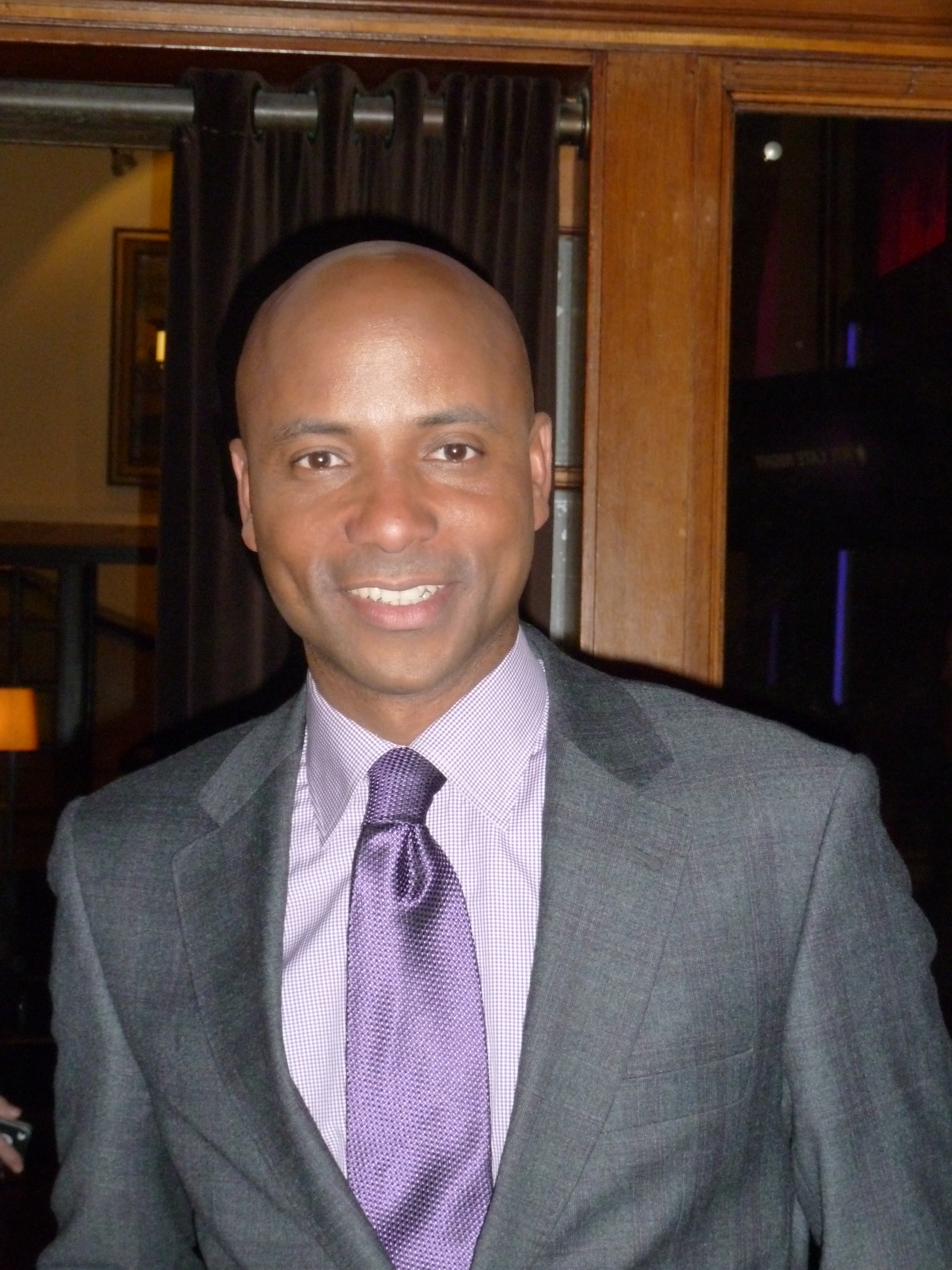 Humberto Tan na de opnames van RTL Late Night